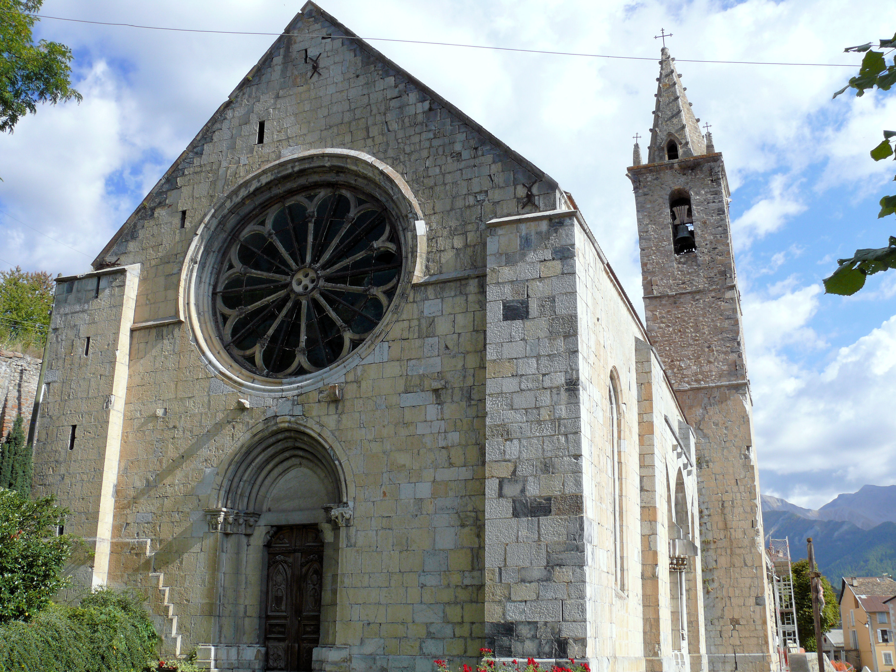 Seyne - Église Notre-Dame-de-Nazareth - Façade occidentale et clocher